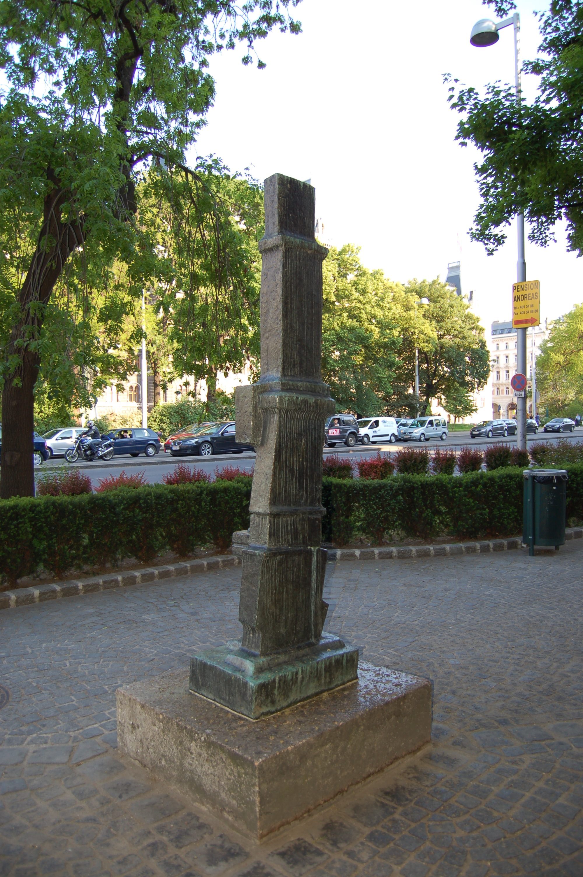 Die Wotruba Skulptur am Friedrich-Schmidt-Platz in Wien-Josefstadt.